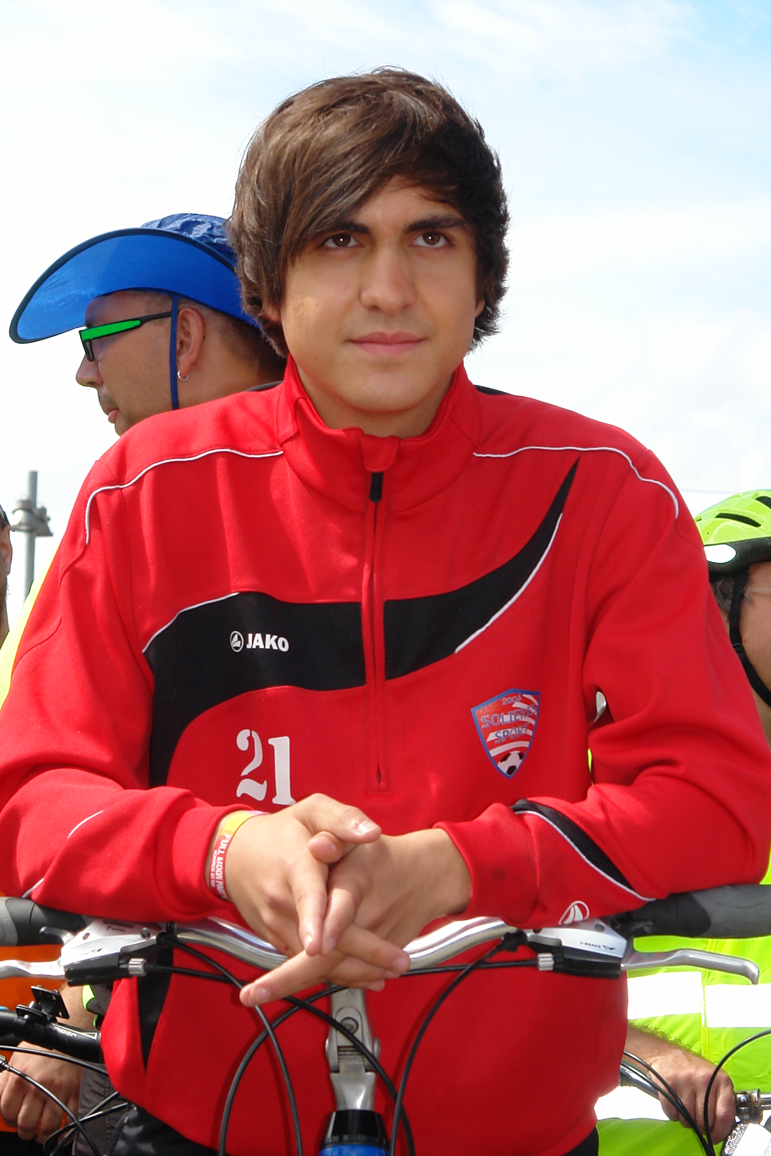 Roberto Bellarosa le le 04 Aout 2012 au Ravel.